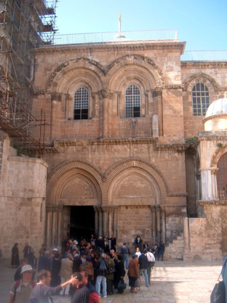 כנסיית הקבר, מבט מבחוץ. church of the Holy Sepulchre.